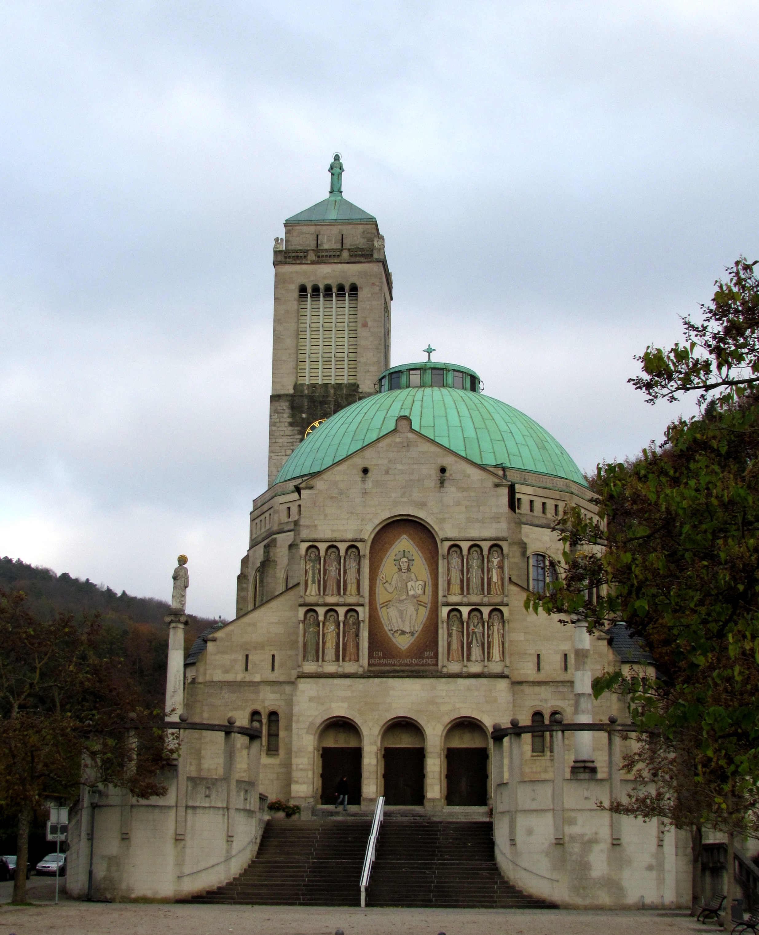 Bildinhalt: Bernharduskirche in Baden-Baden Aufnahmeort: Baden-Baden, Deutschland